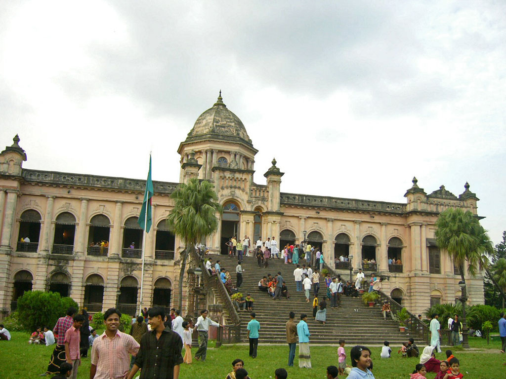 Ahsan Manzil, Dhaka, Bangladesh.